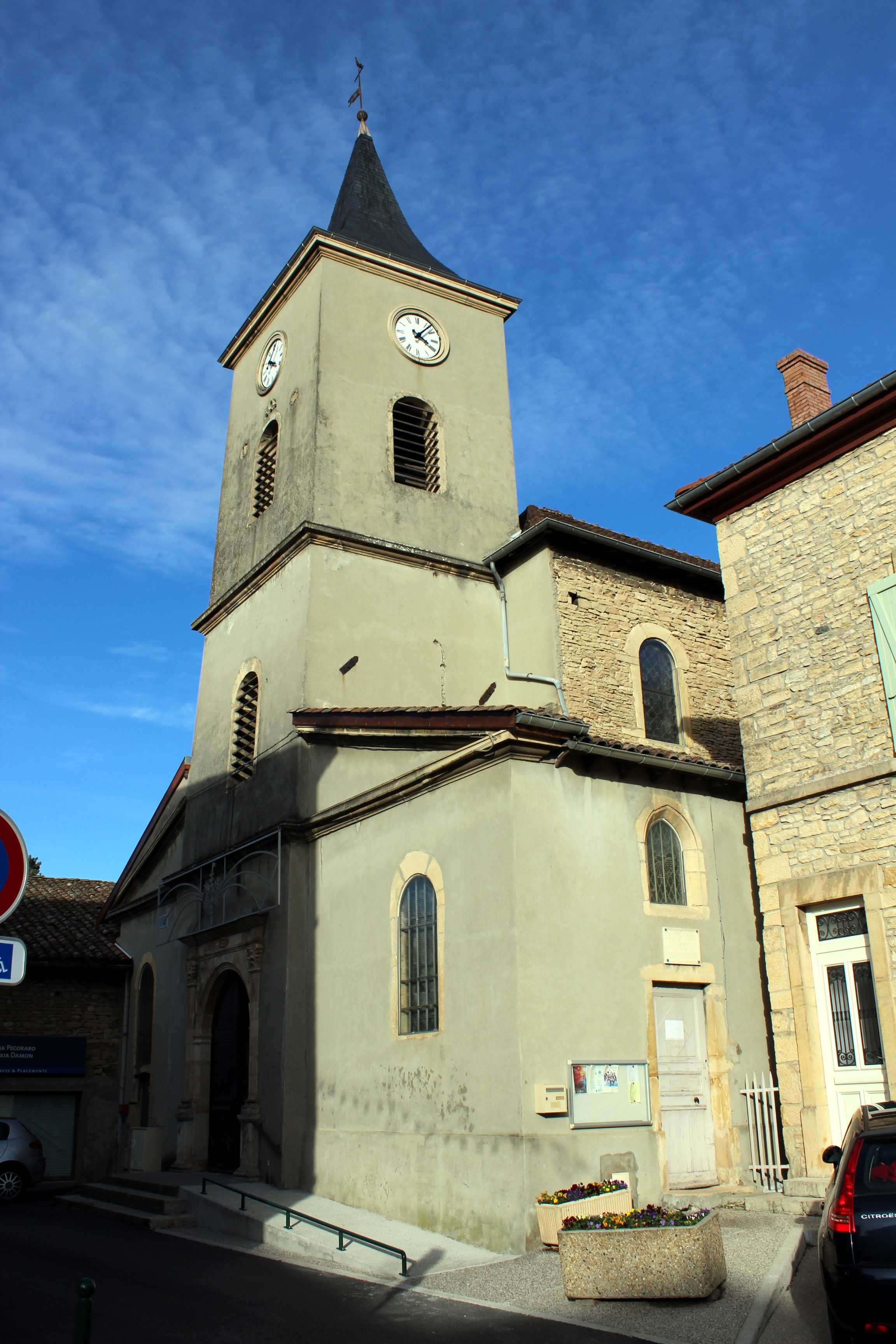 Eglise de Saint-Alban-de-Roche.